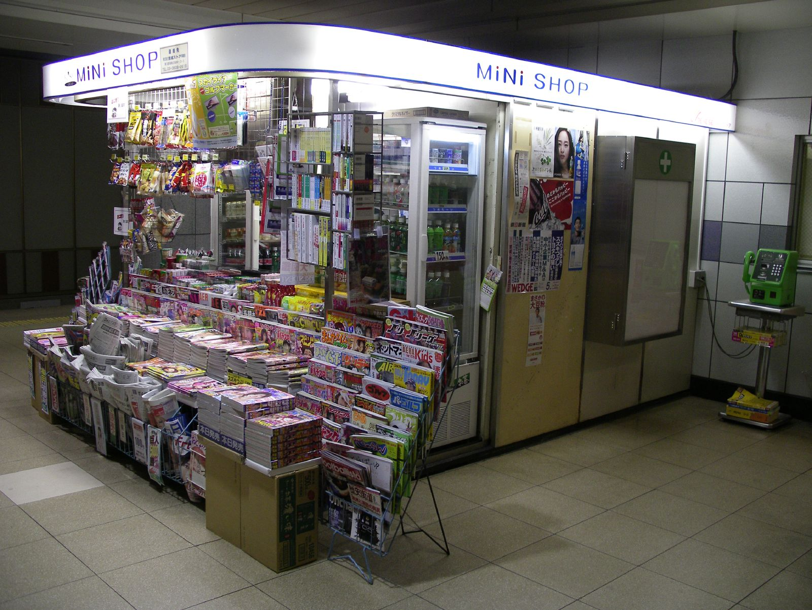 Kiosk